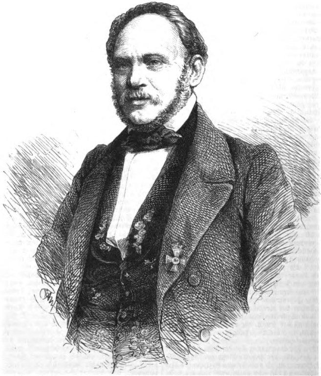 Johann Matthias Firmenich, deutscher Schriftsteller im 19. Jh.